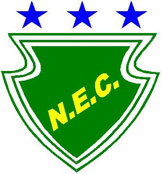 Logo: Náuas Esporte Clube, Cruzeiro do Sul (Acre), Brazil.